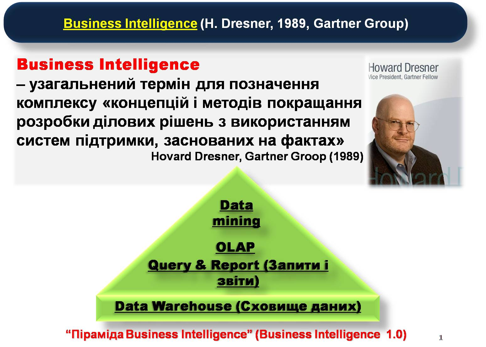 Зображення піраміди засобів Business Intelligence у 1990-роках та фото Говарда Дрезнера з його цитатою-визначенням BI